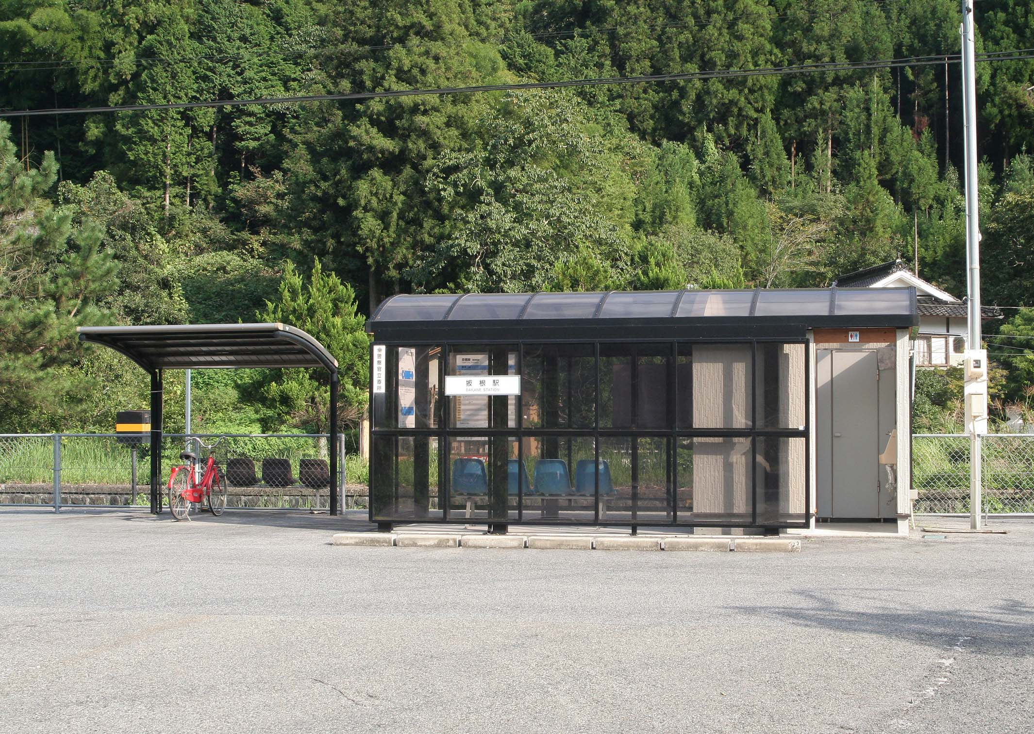 西日本旅客鉄道 坂根駅の駅舎